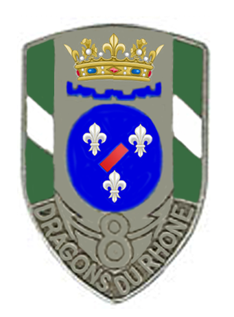 insigne regementaire du 8° régiment de dragons